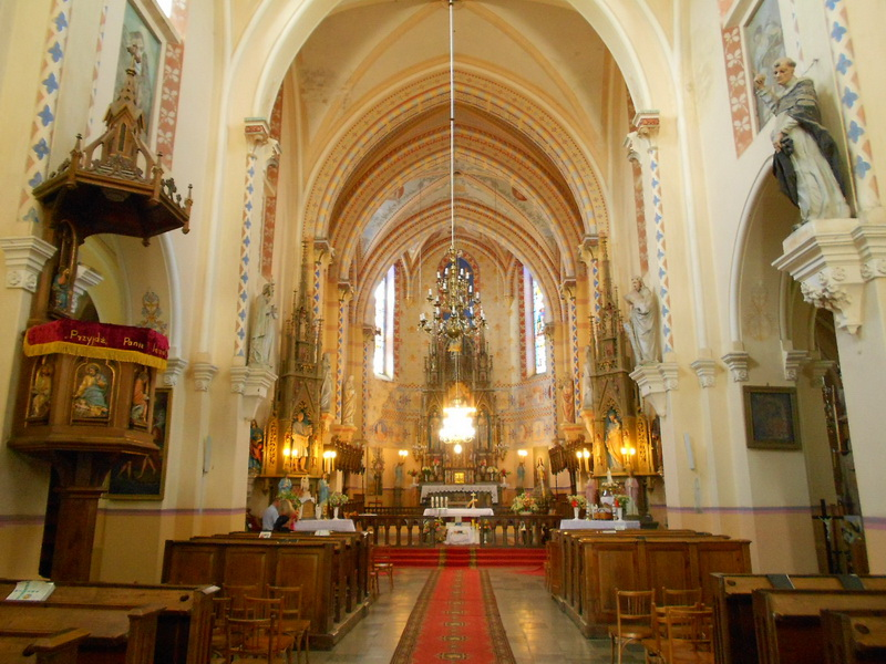 Старыя Васілішкі. Касцёл Святых Пятра і Паўла